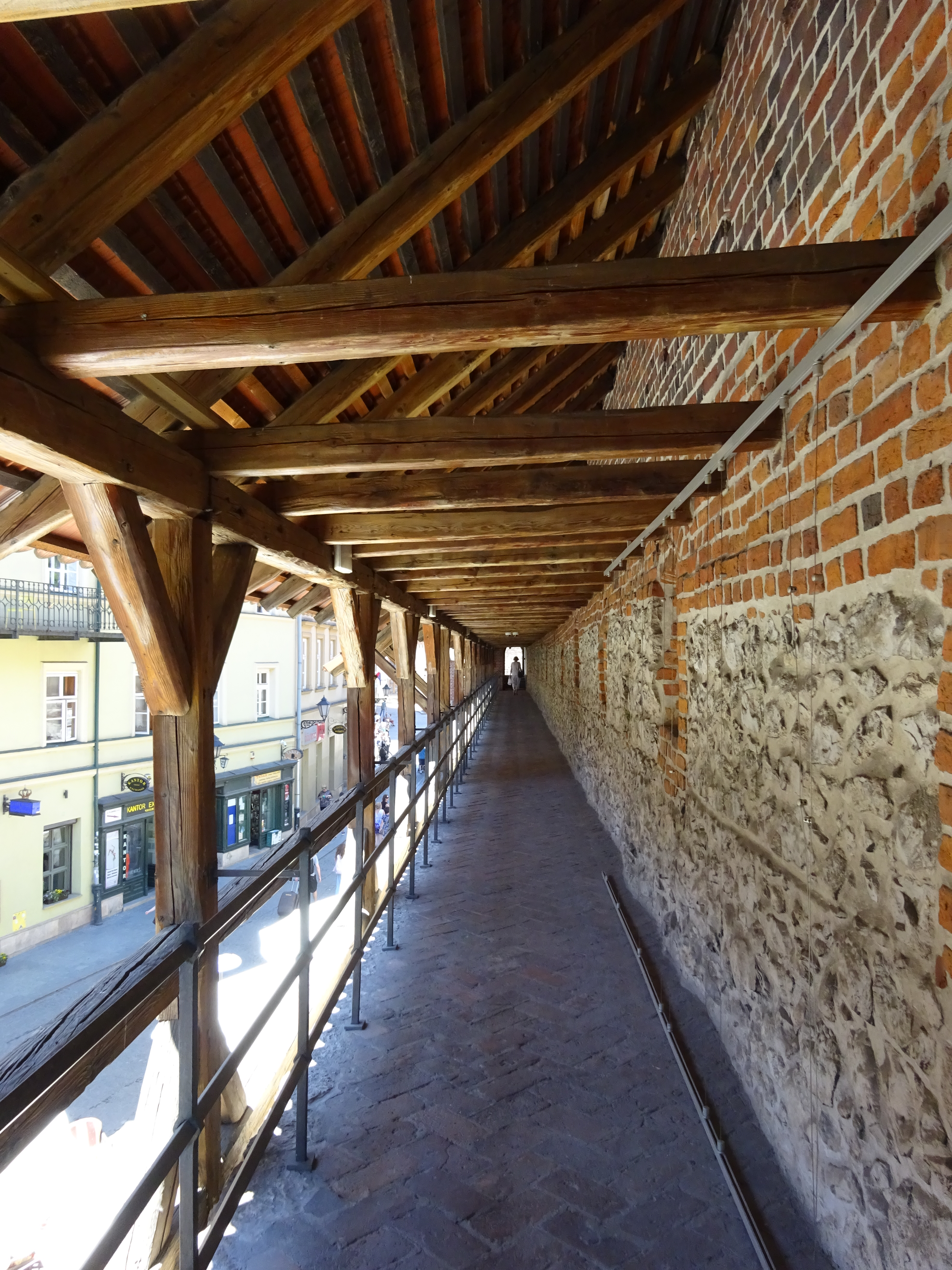 Ganek straży na murach obronnych między Brama Floriańską a Basztą Pasamoników. Kraków, 2016.